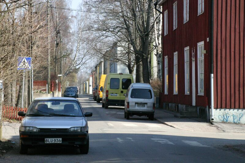 Limingantien länsipää Helsingin Kumpulassa